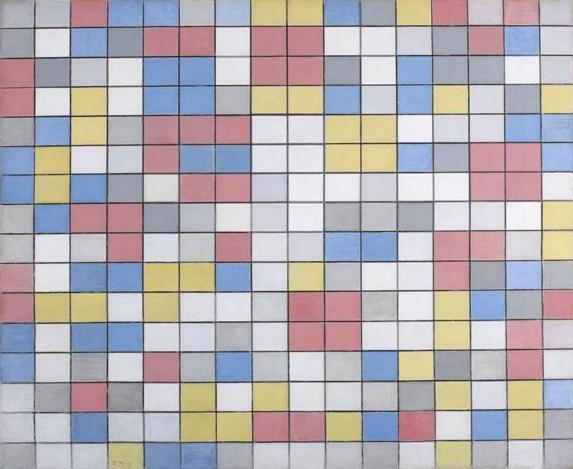 Kompozicija s rešetkama 9